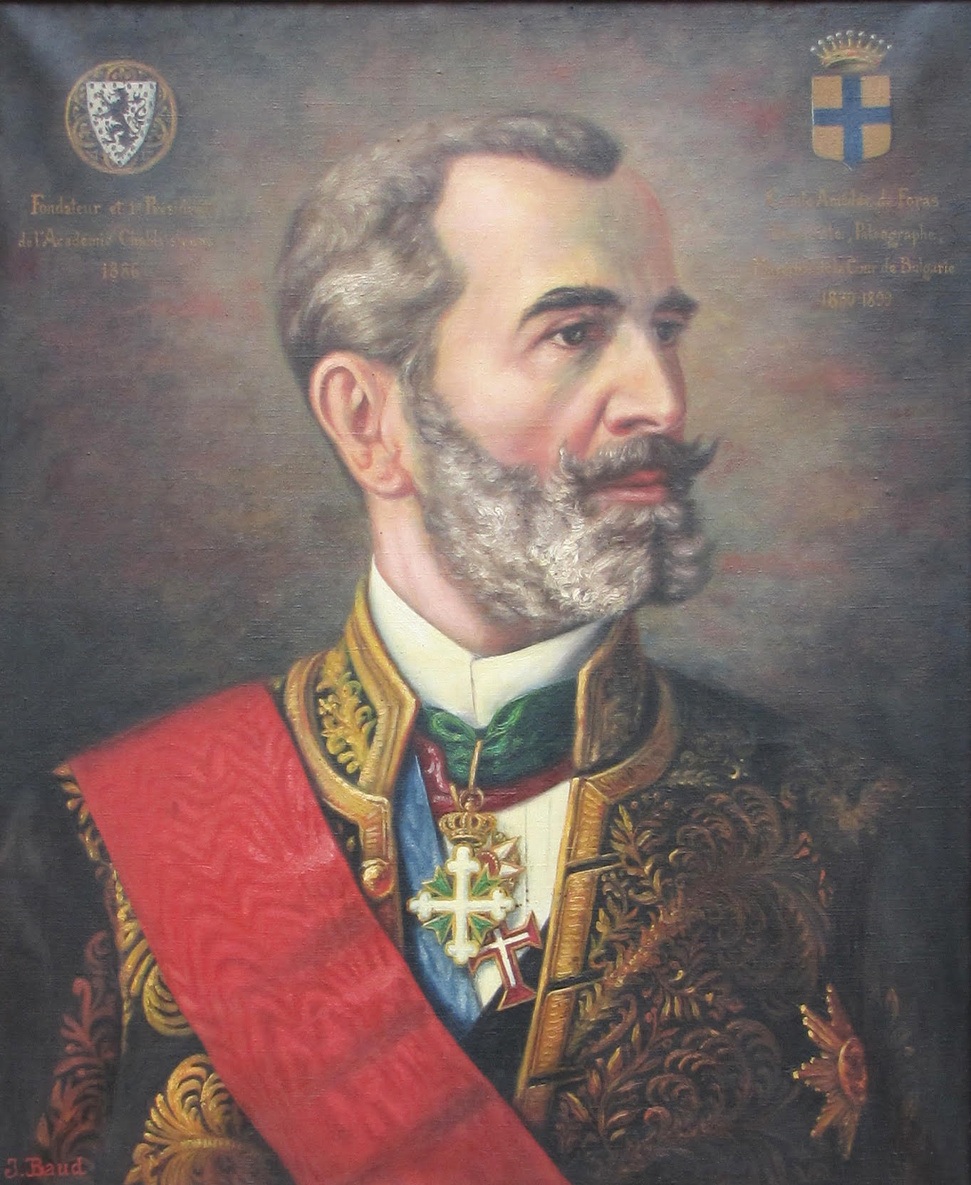 Portrait posthume d'Amédée de Foras, par J. Baud Académie Chablaisienne Thonon-les-Bains